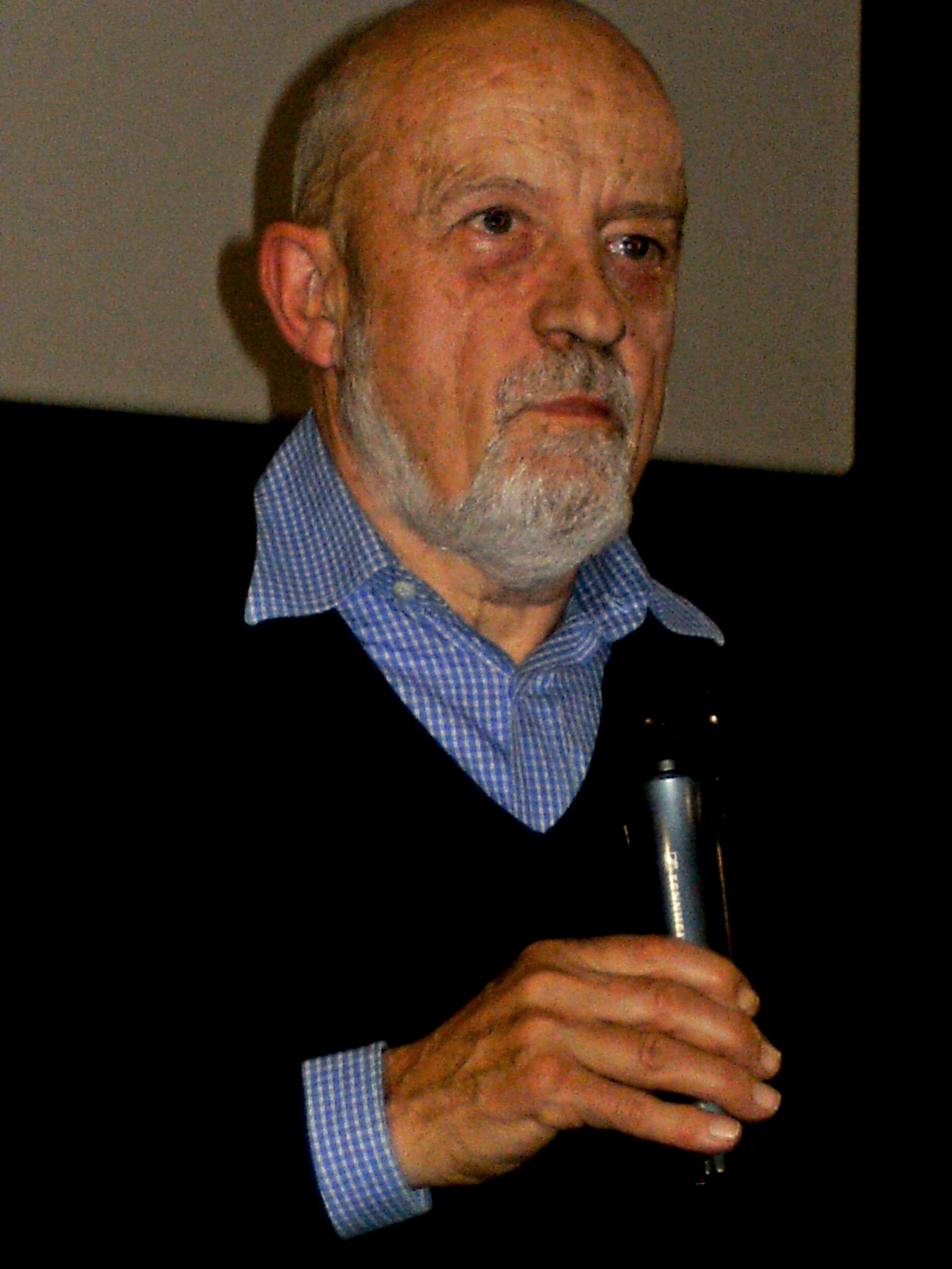 Le cinéaste Luc Moullet le 28 décembre 2009